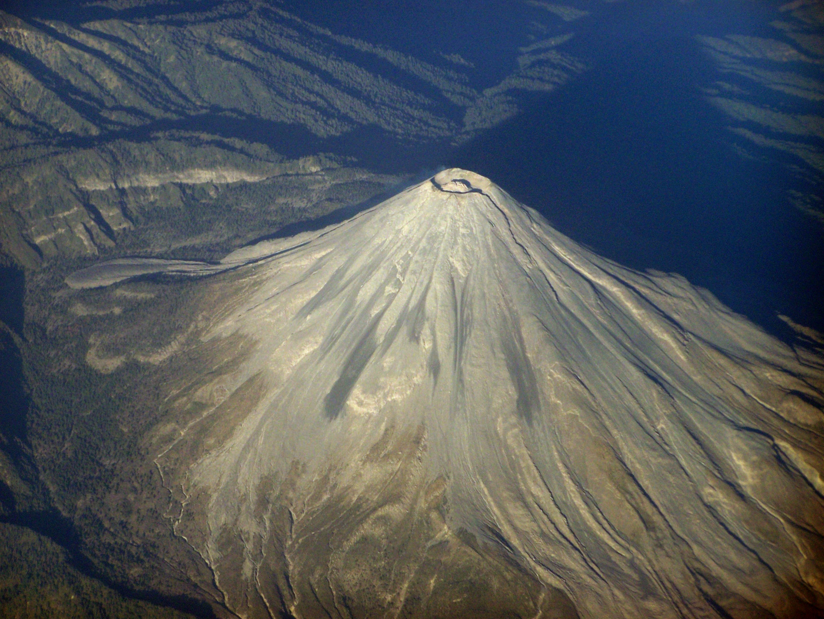 Aerial view of Colima volcano.